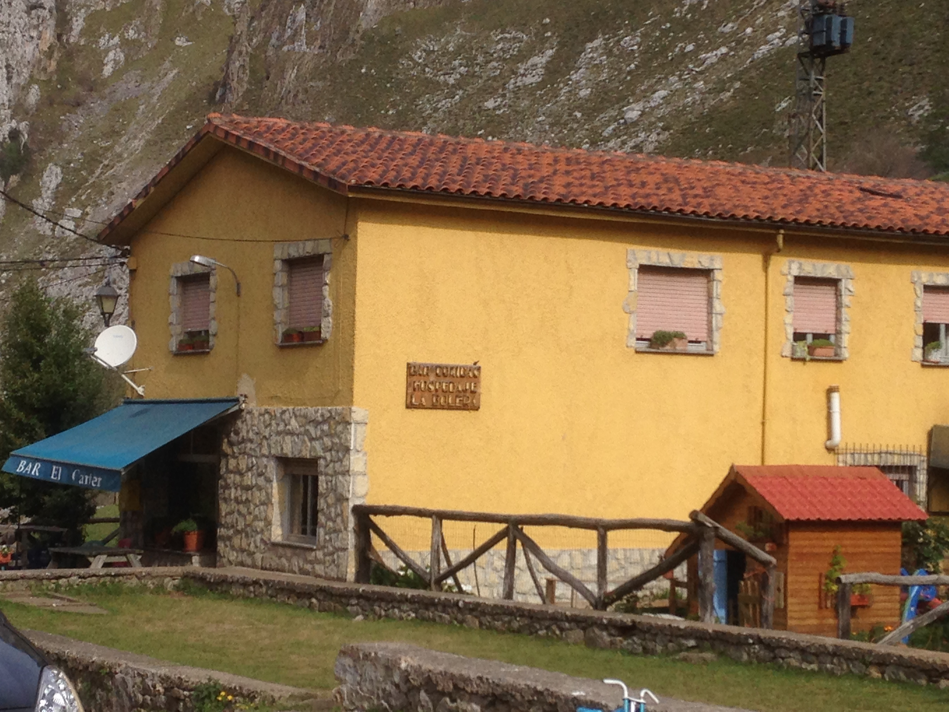 Establecimiento "Casa cartero" en Tielve, Asturias (España)